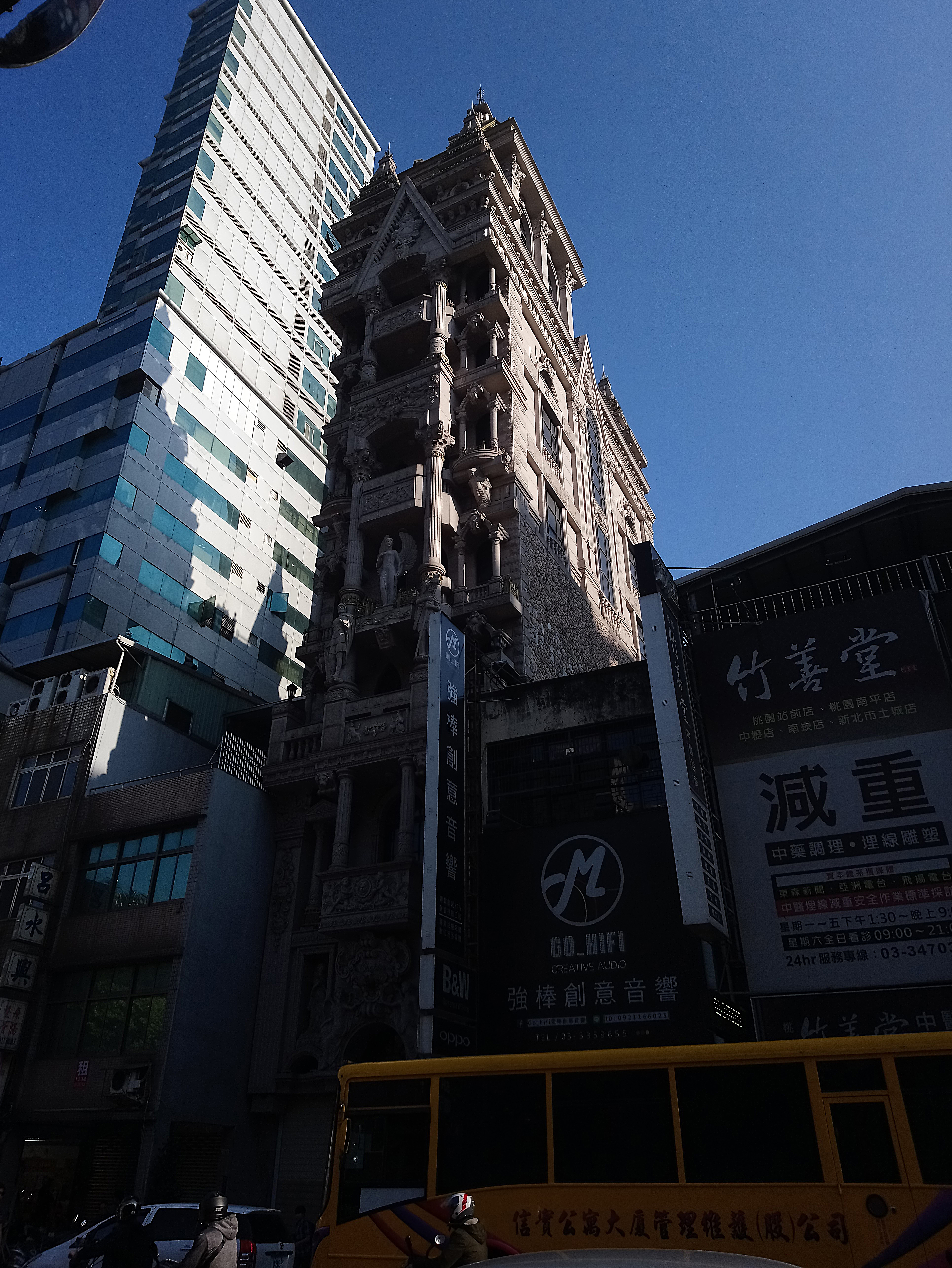 桃園怪怪屋,桃園市桃園區市中次分區武陵里